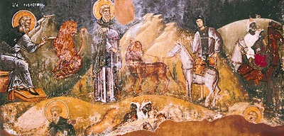 Сцены из Жития прп. Герасима Иорданского. Роспись ц. во имя свт. Николая Орфаноса в Фессалонике. 1309-1319 гг.